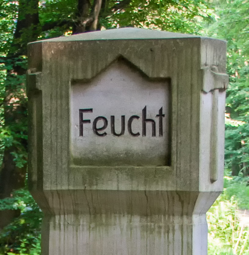 Forstreviergrenzstein, Hutberg, zwischen Feucht und Fischbach, Ansicht Feucht, Waldhammer